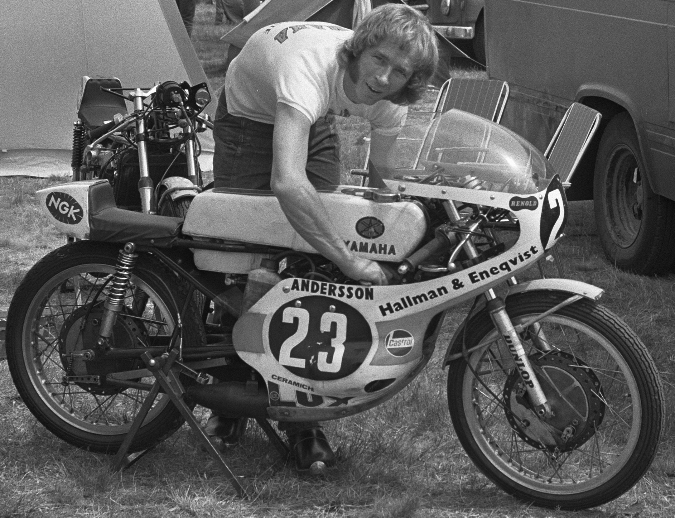 Training TT Assen, nummer 7 Andersson (kop)